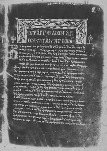 the beginning of the Gospel of Matthew